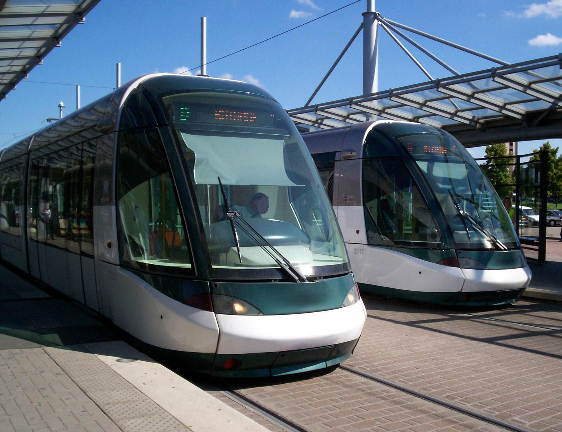 Tramways de Strasbourg Lignes A et D à La Rotonde, le 26 Août 2007, jour de l'inauguration de l'extension du réseau Tramway Strasbourgeois